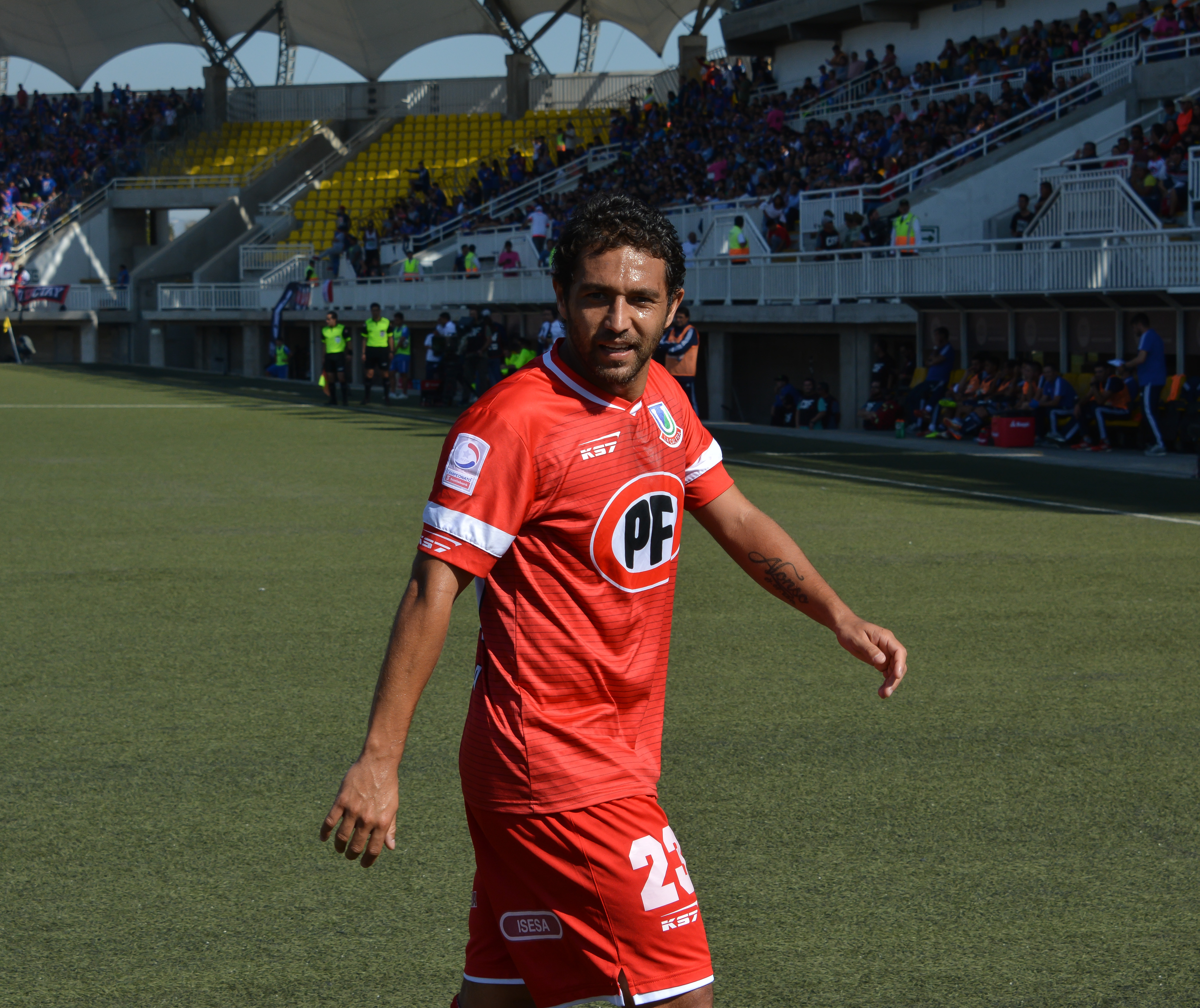 Unión La Calera v Universidad de Chile, Estadio Municipal Lucio Fariña Fernández, Quillota, Chile.